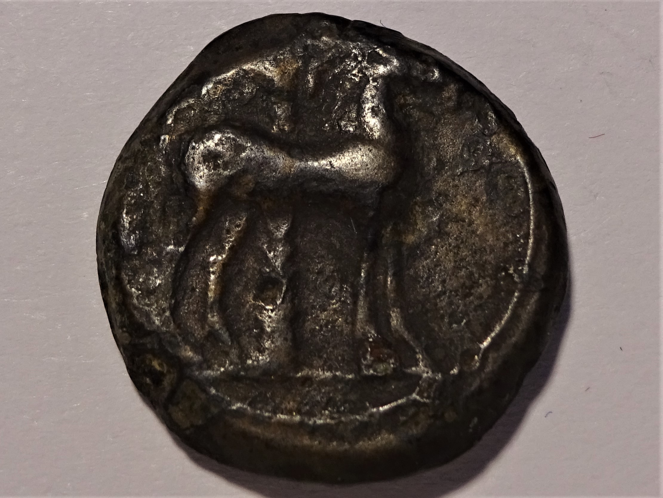 Rückseite der Münze mit Pferd und Palme im Hintergrund